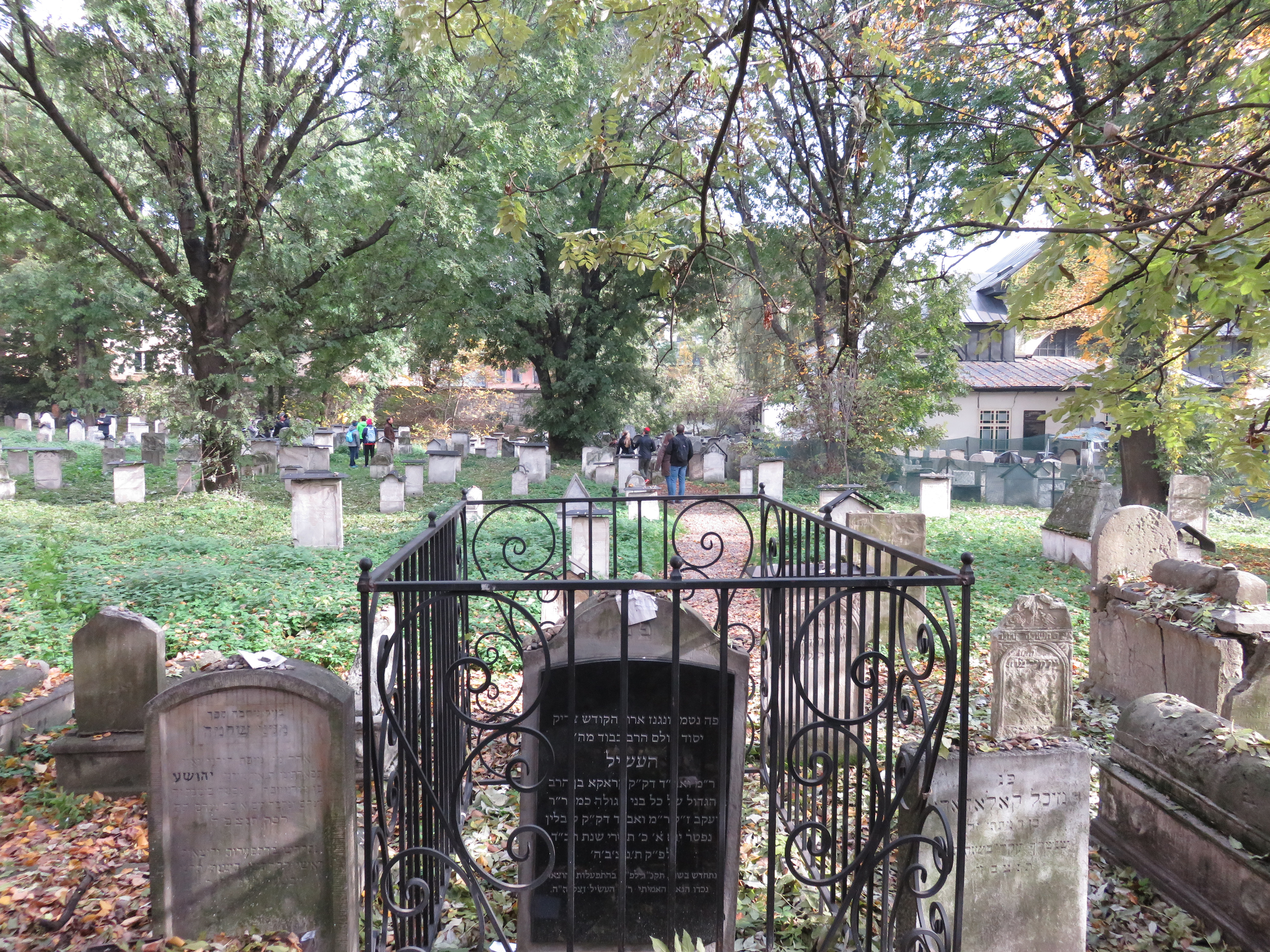 מצבת רבי השיל מקראקא. בית הקברות היהודי העתיק בקרקוב (2).jpg